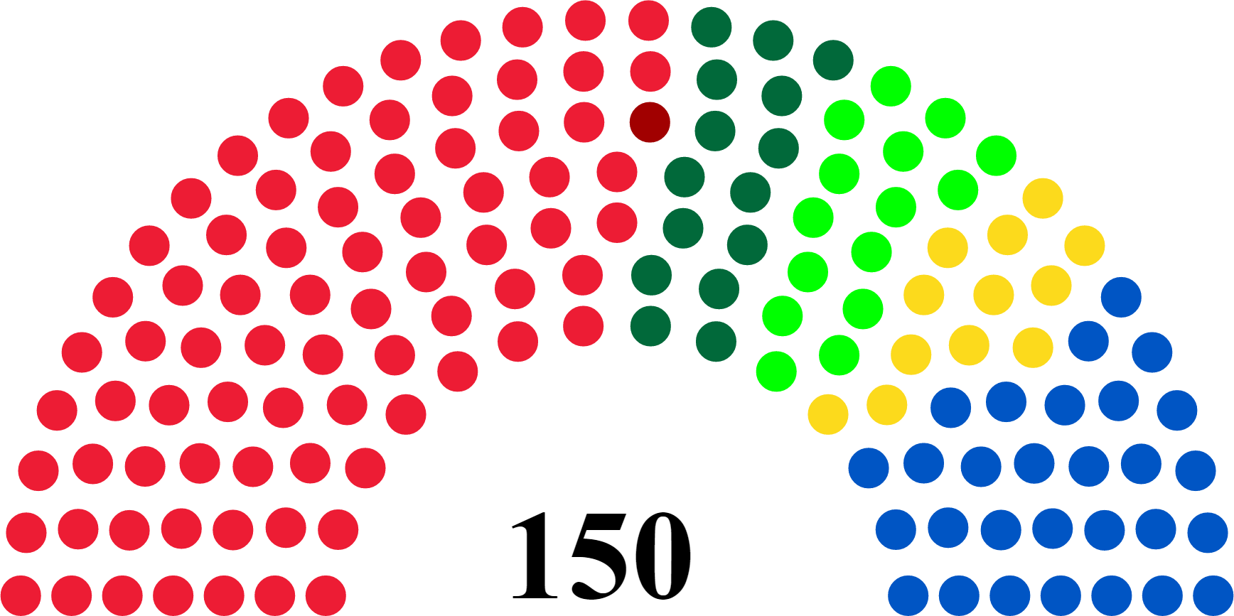 Mandatfördelning i Stortinget 1957-1961 Vänster-höger Arbeiderpartiet: 78 mandat Norges Komunistiske Parti: 1 mandat Senterpartiet: 15 mandat Venstre: 15 mandat Kristelig Folkeparti: 12 mandat Høyre: 29 mandat